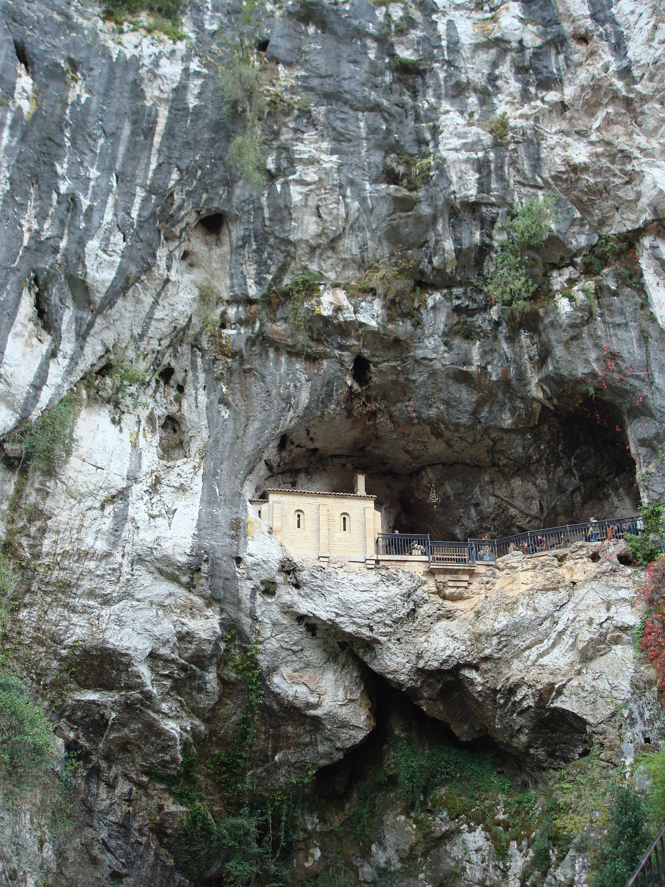 Santuario de Covadonga y alrededores (Cangas de Onis) - 0018